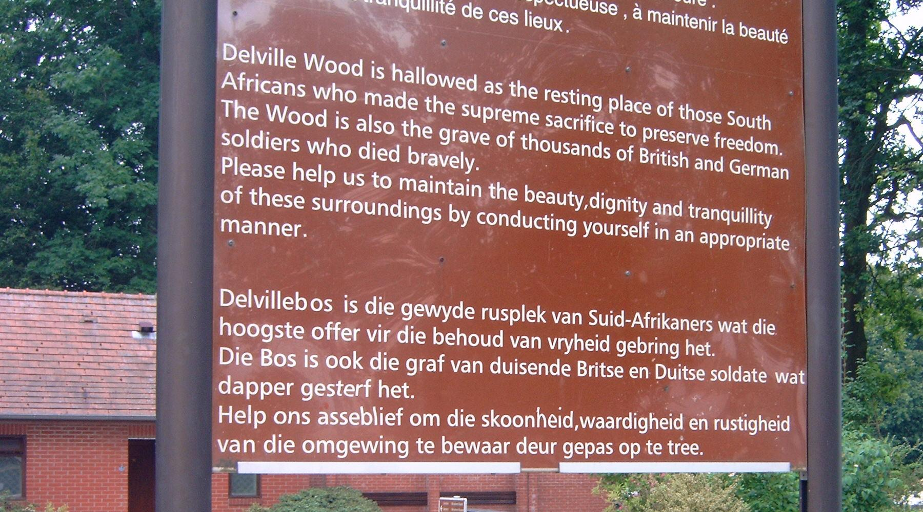 Delvillebos